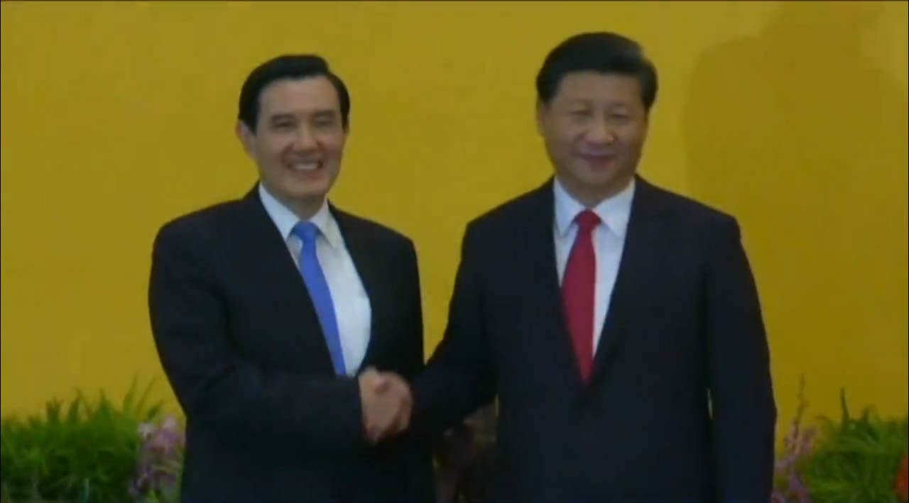 中文（中国大陆）: 台湾领导人马英九先生（图左）与大陆领导人习近平先生（图右）在新加坡香格里拉酒店历史性握手会面中文（香港）: 習近平與馬英九在新加坡歷史性握手相見